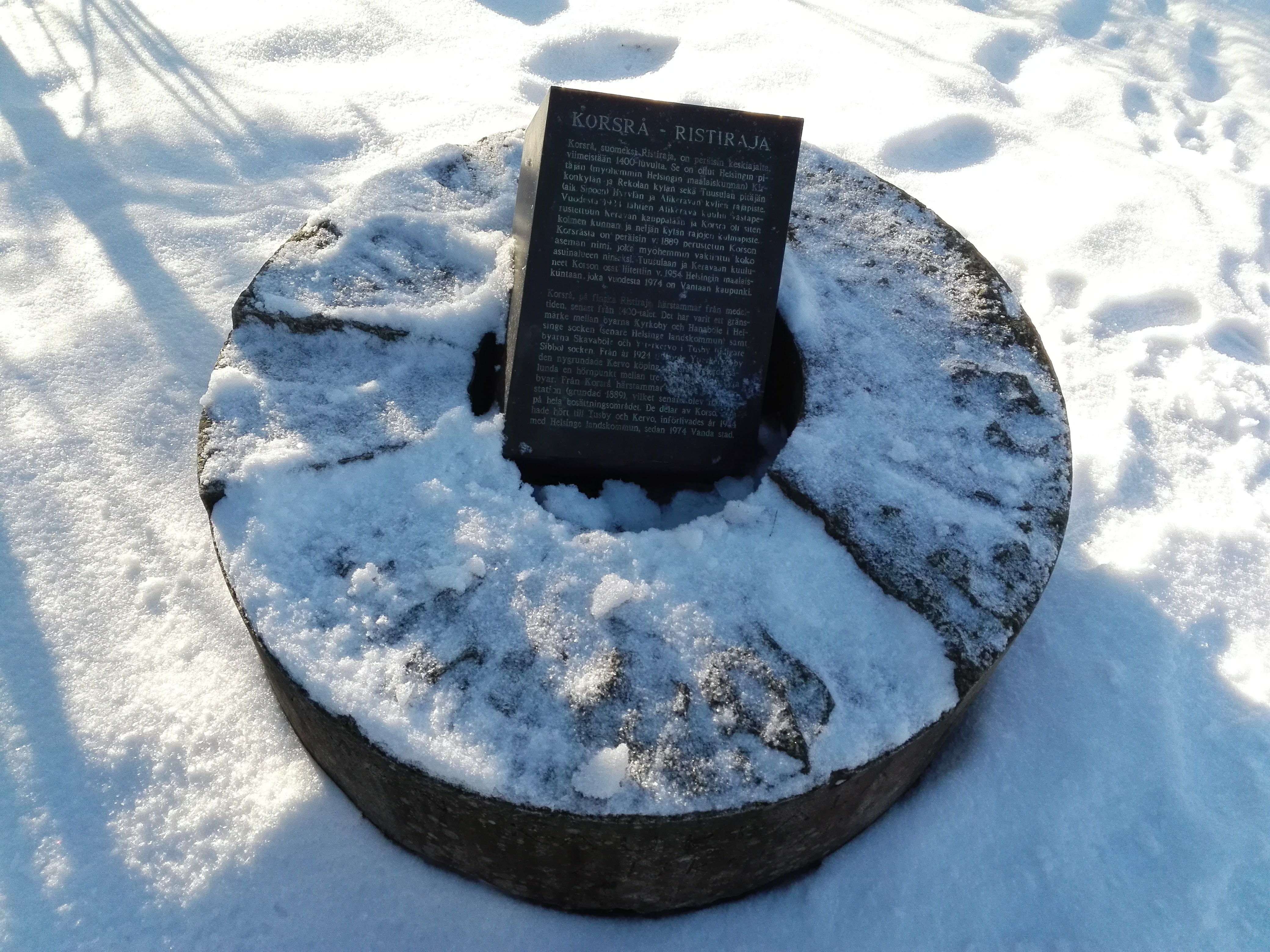 Korson rajapyykin muistomerkki lähellä Ruusuvuoren koulua.